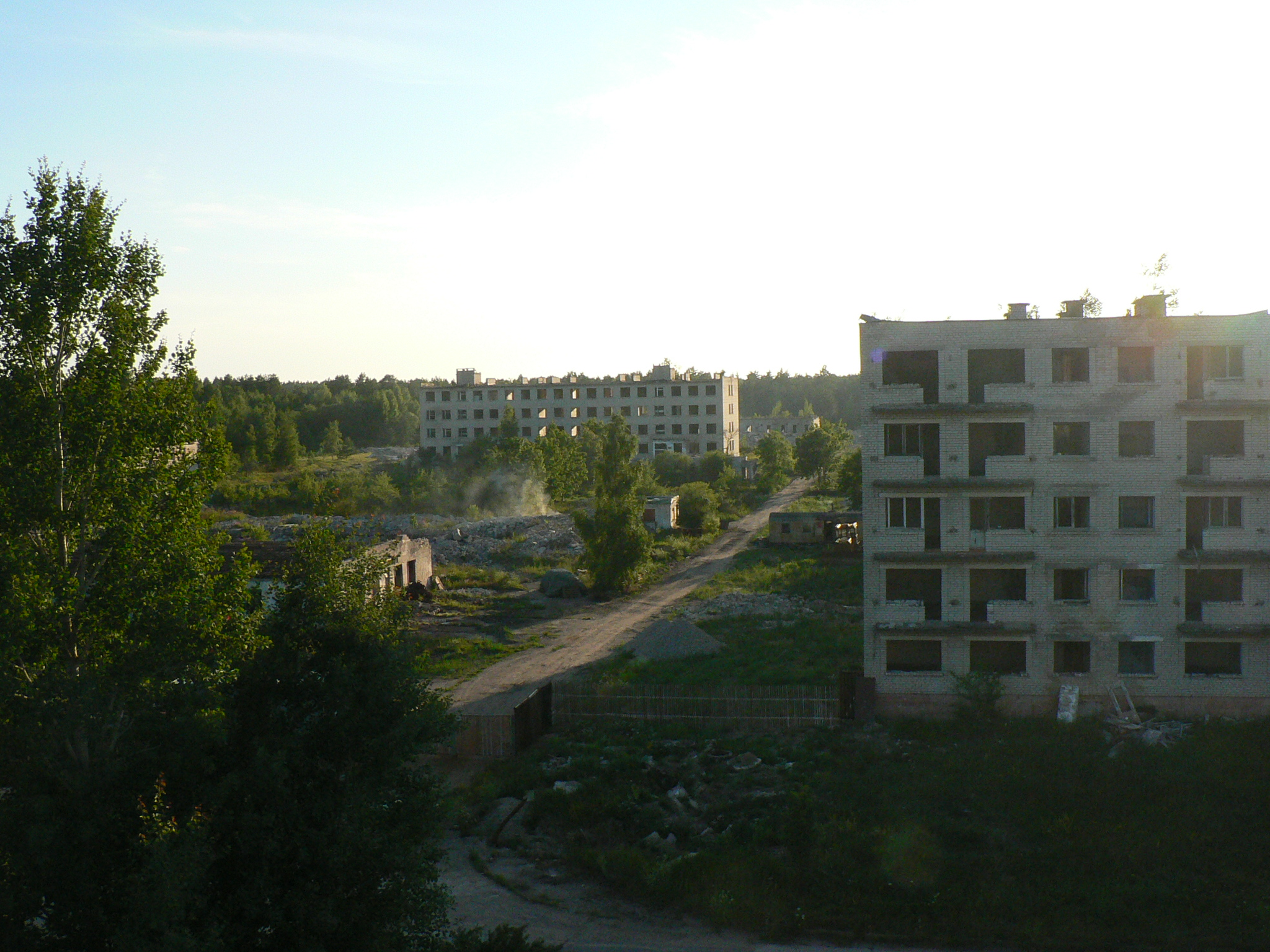 Irbenės griuvėsiai, Ventspilio sav., Latvija